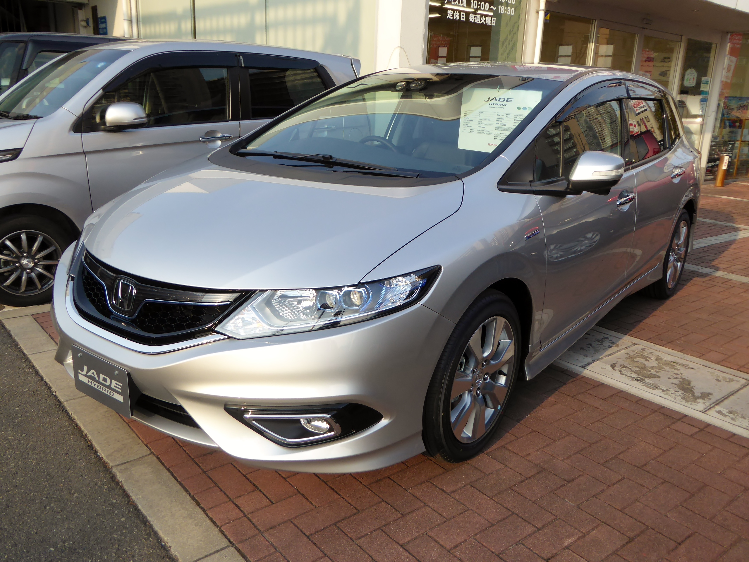 FR4型ホンダ・ジェイドハイブリッドXをフロントから撮影。